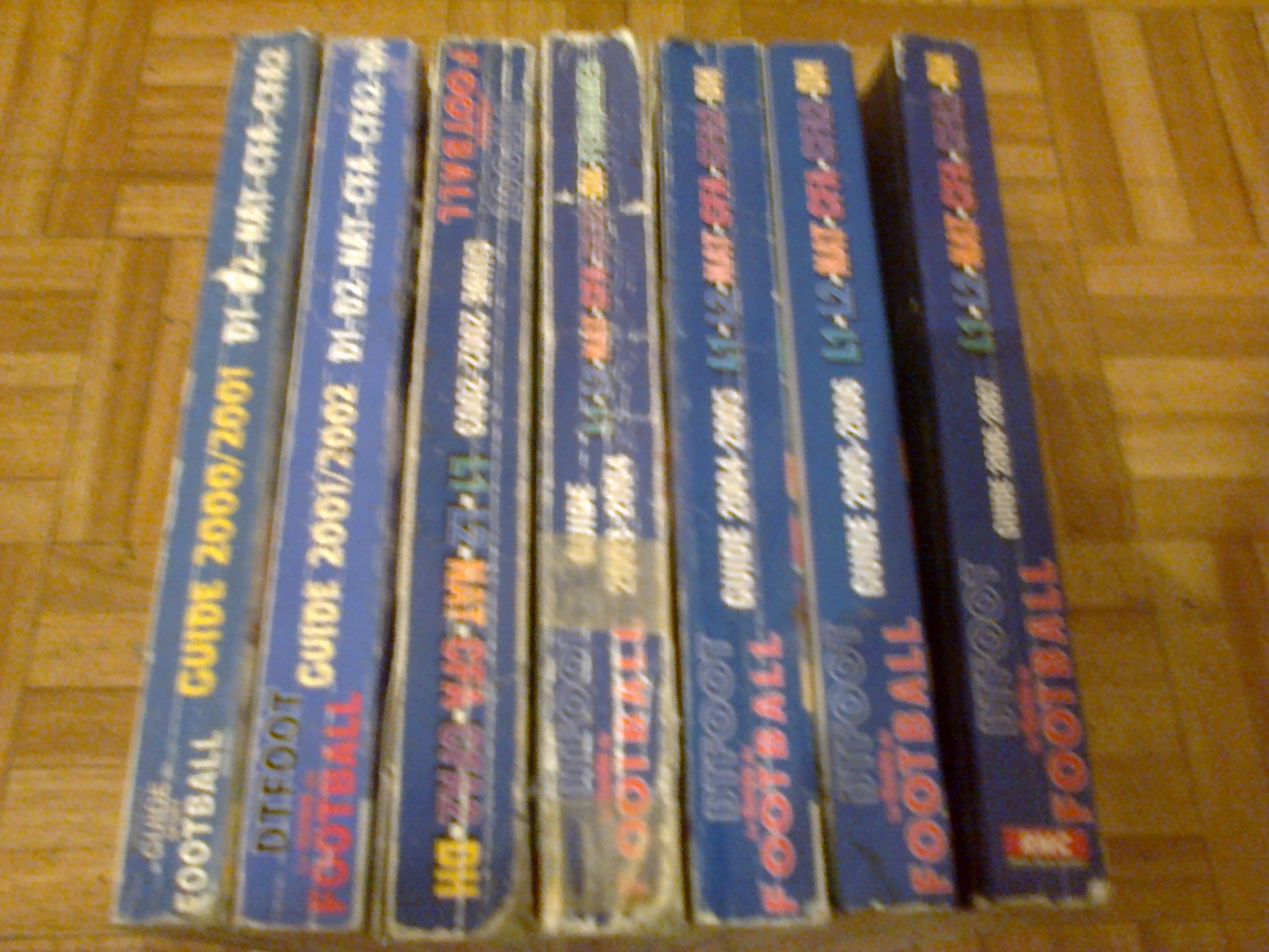 Collection des DTFOOT de 2000-2001 à 2006-2007